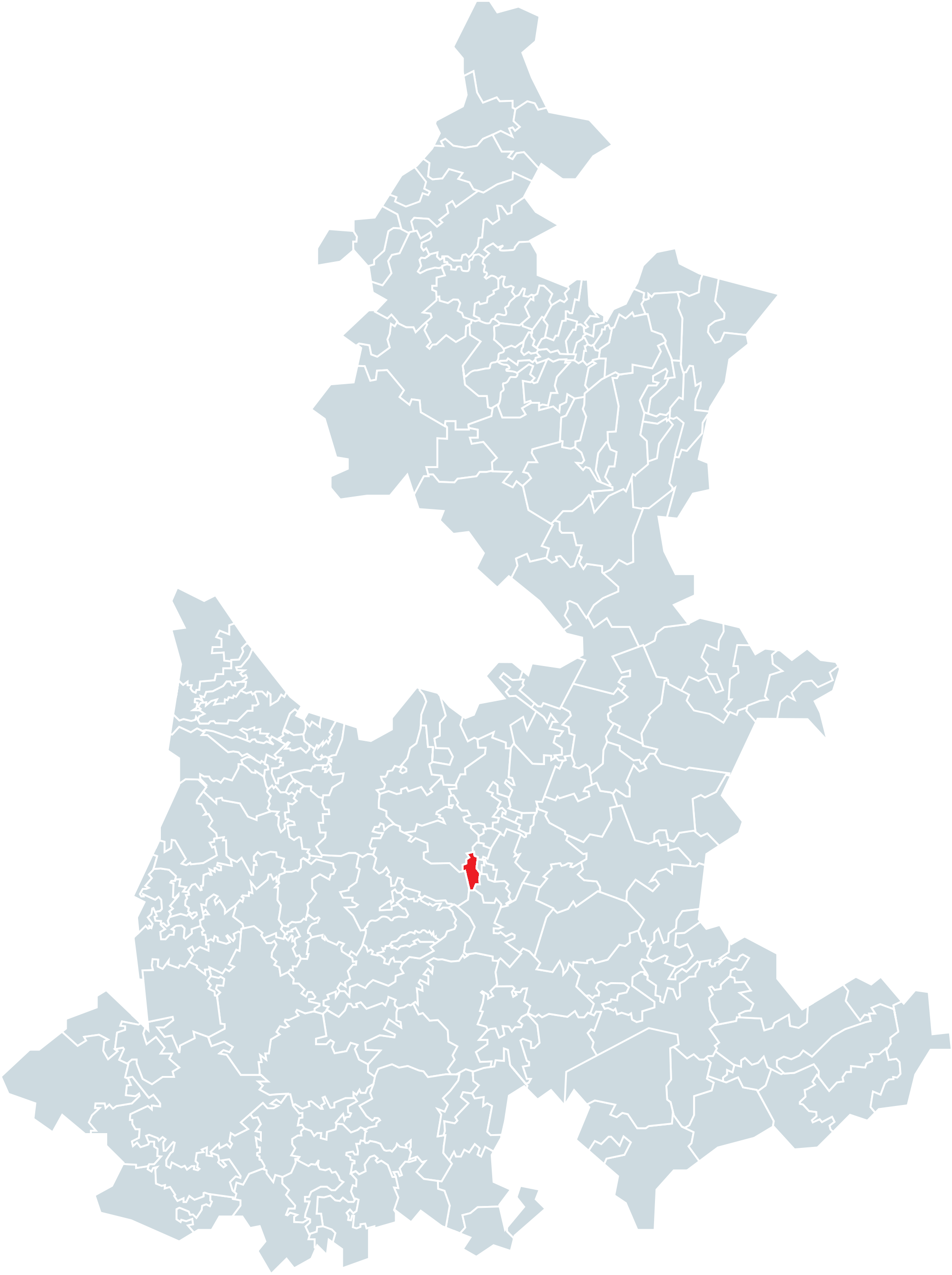 Municipio de Atoyatempan